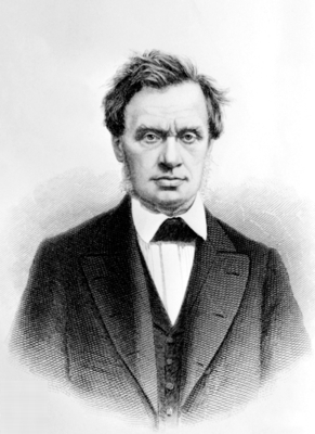 Савич Алексей Николаевич (1810 - 1883), русский астроном